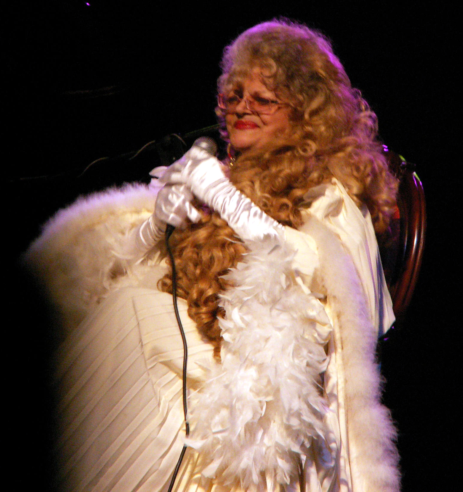 V. Villas podczas recitalu w DMiT w Zabrzu 22 stycznia 2010 r.